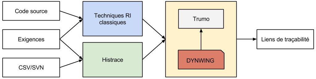 Explication simpliste du fonctionnement de Trustrace